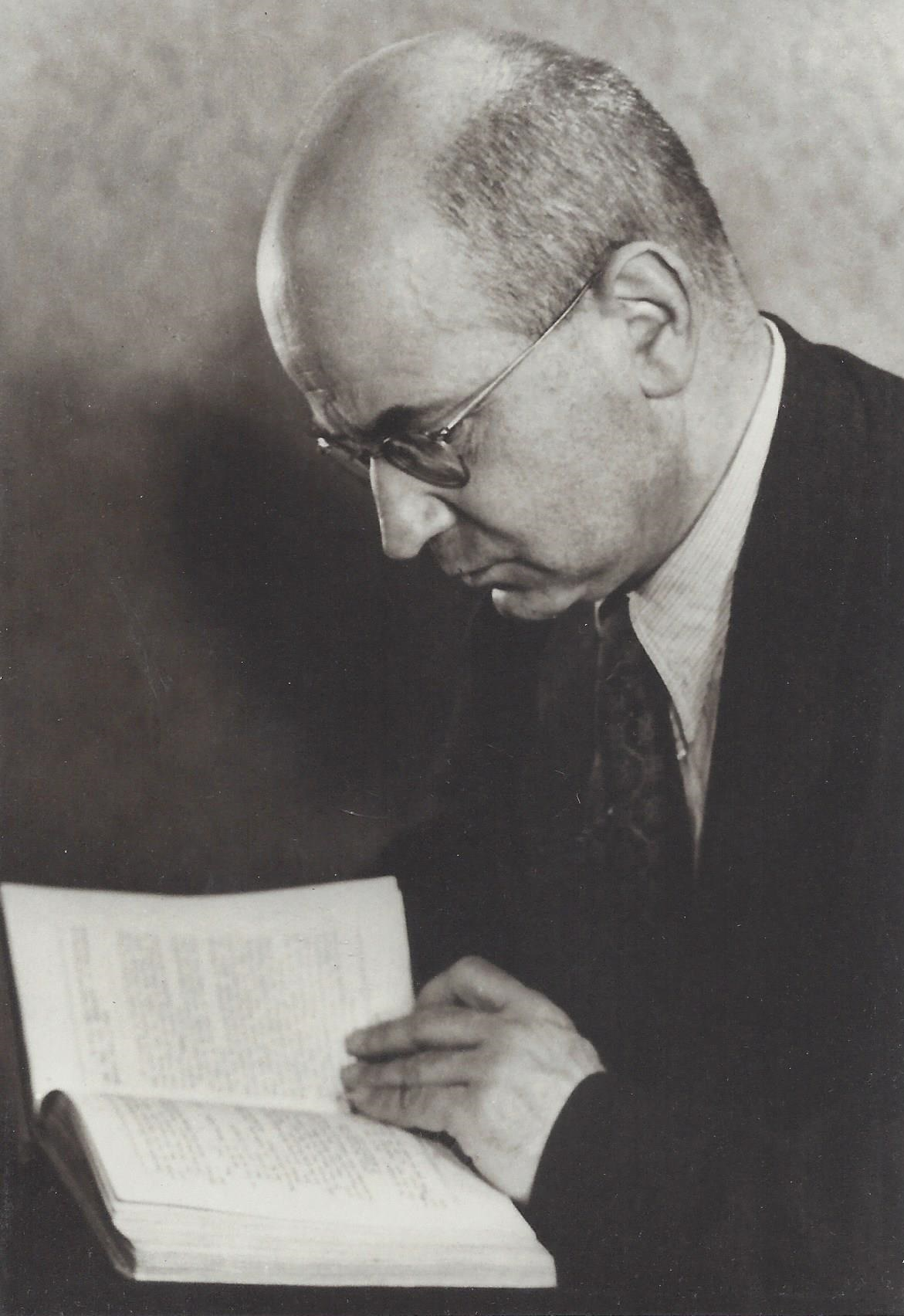 Profilaufnahme von Kurt Forstreuter